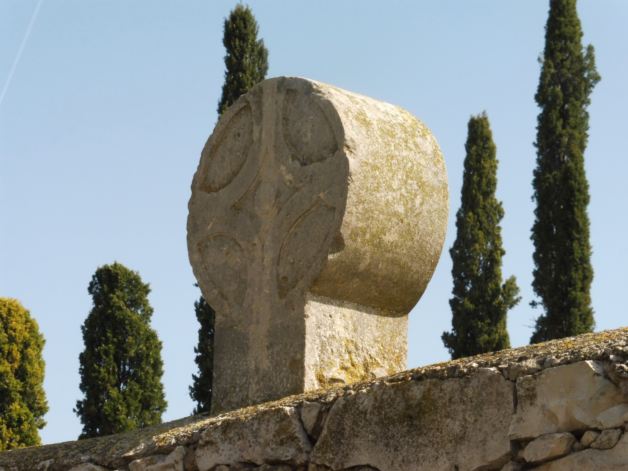 Cementiri nou de Belianes: estela discoïdal